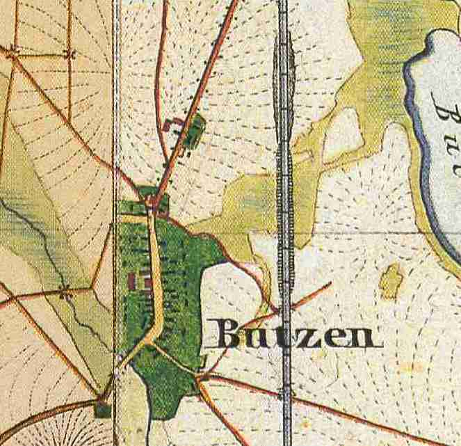 Butzen, Ortsteil der Gemeinde Spreewaldheide, Landkreis Dahme-Spreewald, Brandenburg, Deutschland, Ausschnitte aus den Urmesstischblättern 4050 Straupitz und 4051 Lieberose von 1846